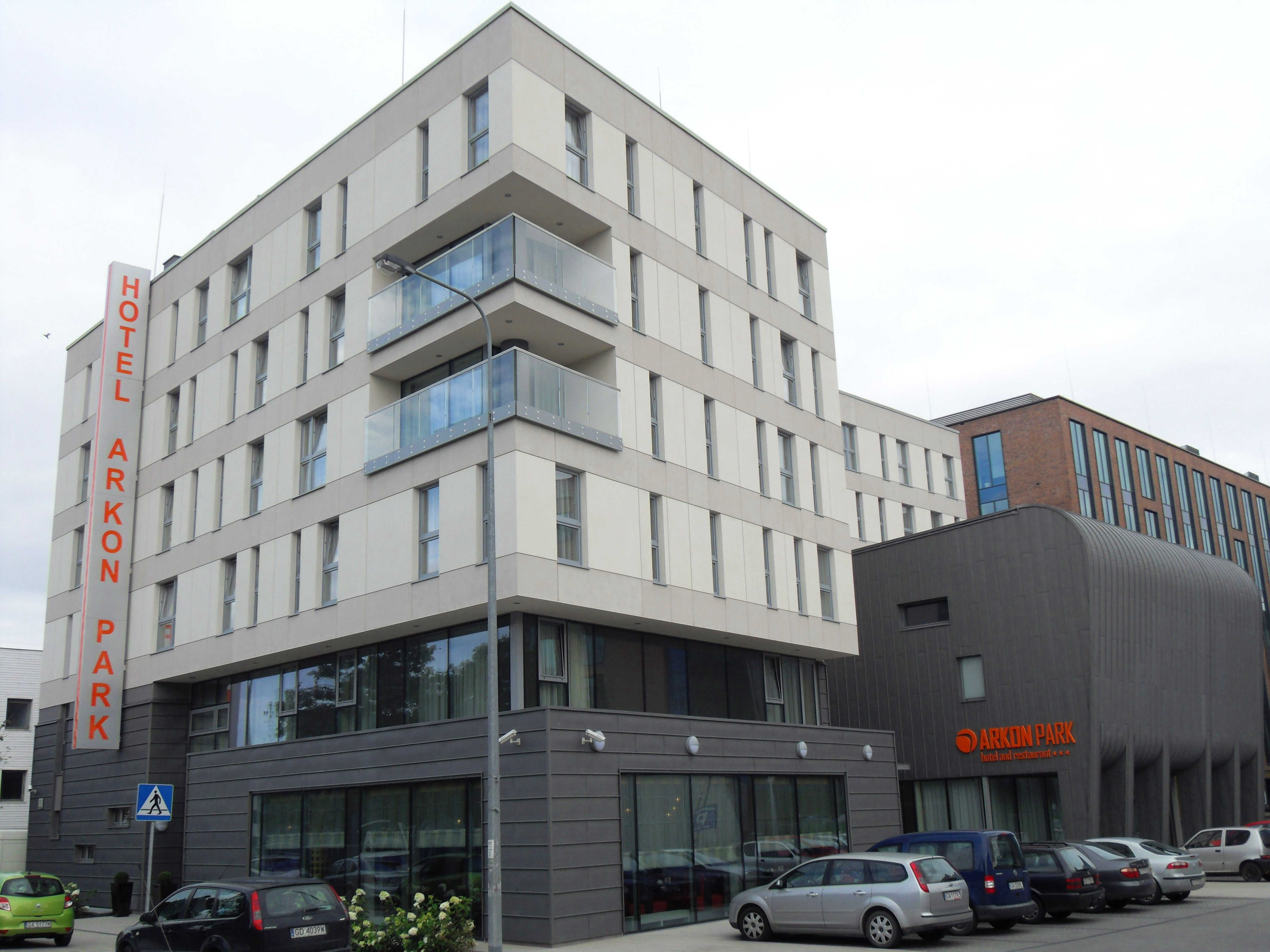 Gdańsk Przymorze. Hotel Arkon Park, ul. Śląska 10.